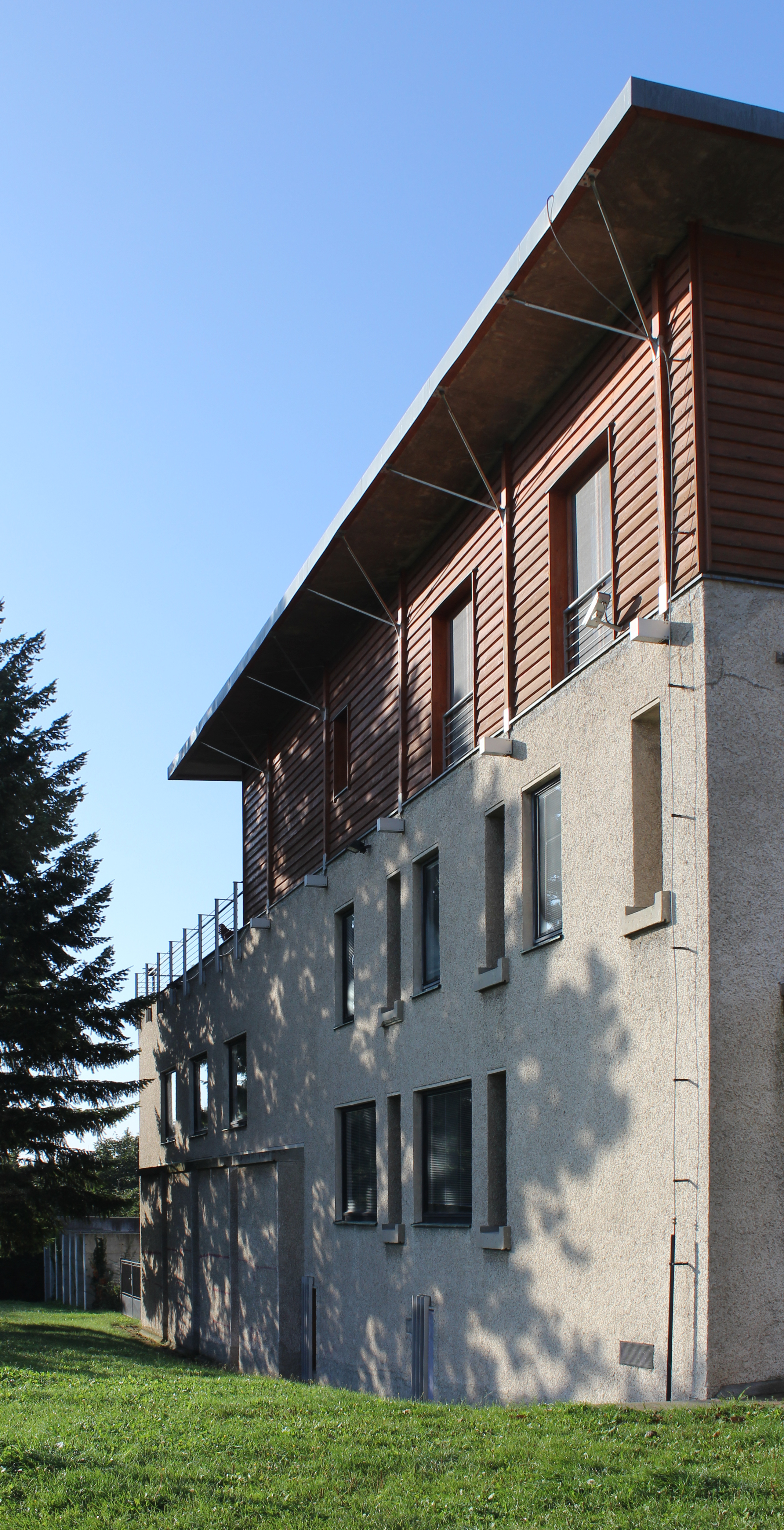 Východní průčelí kostela U Jákobova žebříku.